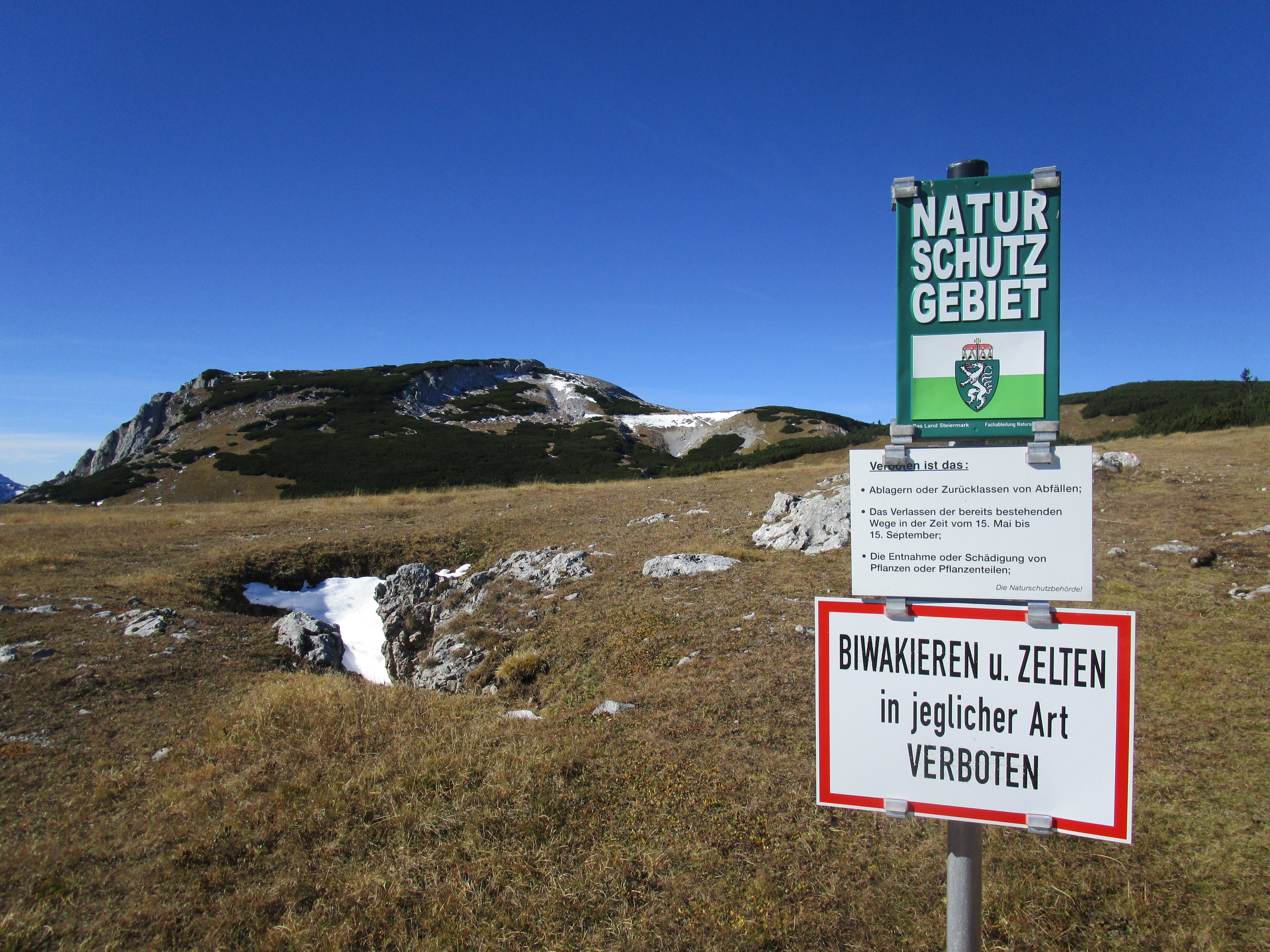 Naturschutzgebiet Almböden im Bereich des Trenchtlings, Edelweißboden, Blickrichtung Westen This media shows the nature reserve in Styria with the ID NSG 96 c.